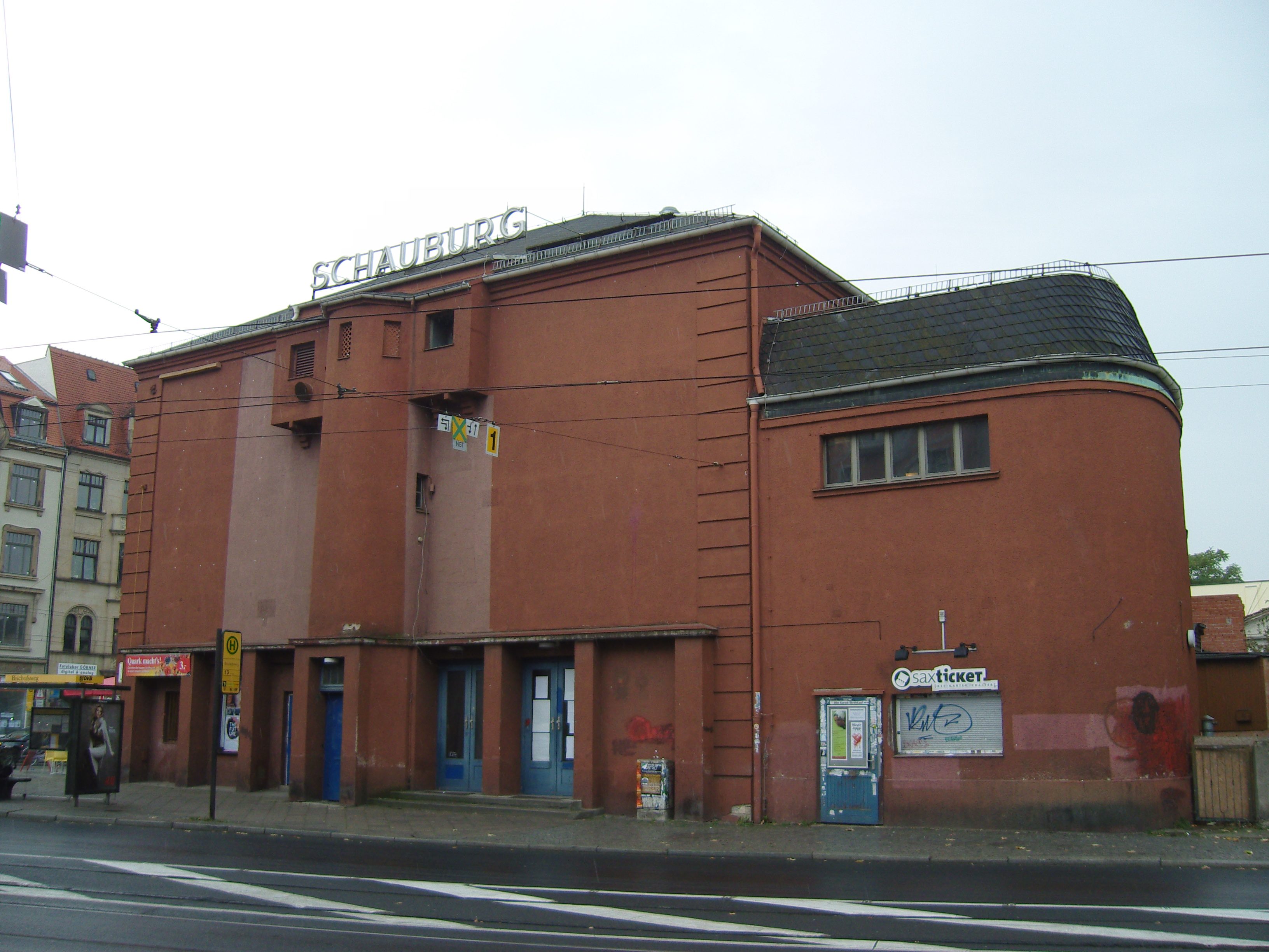 Denkmalgeschütztes Kino Schauburg in Dresden, gesehen vom Bischofsweg